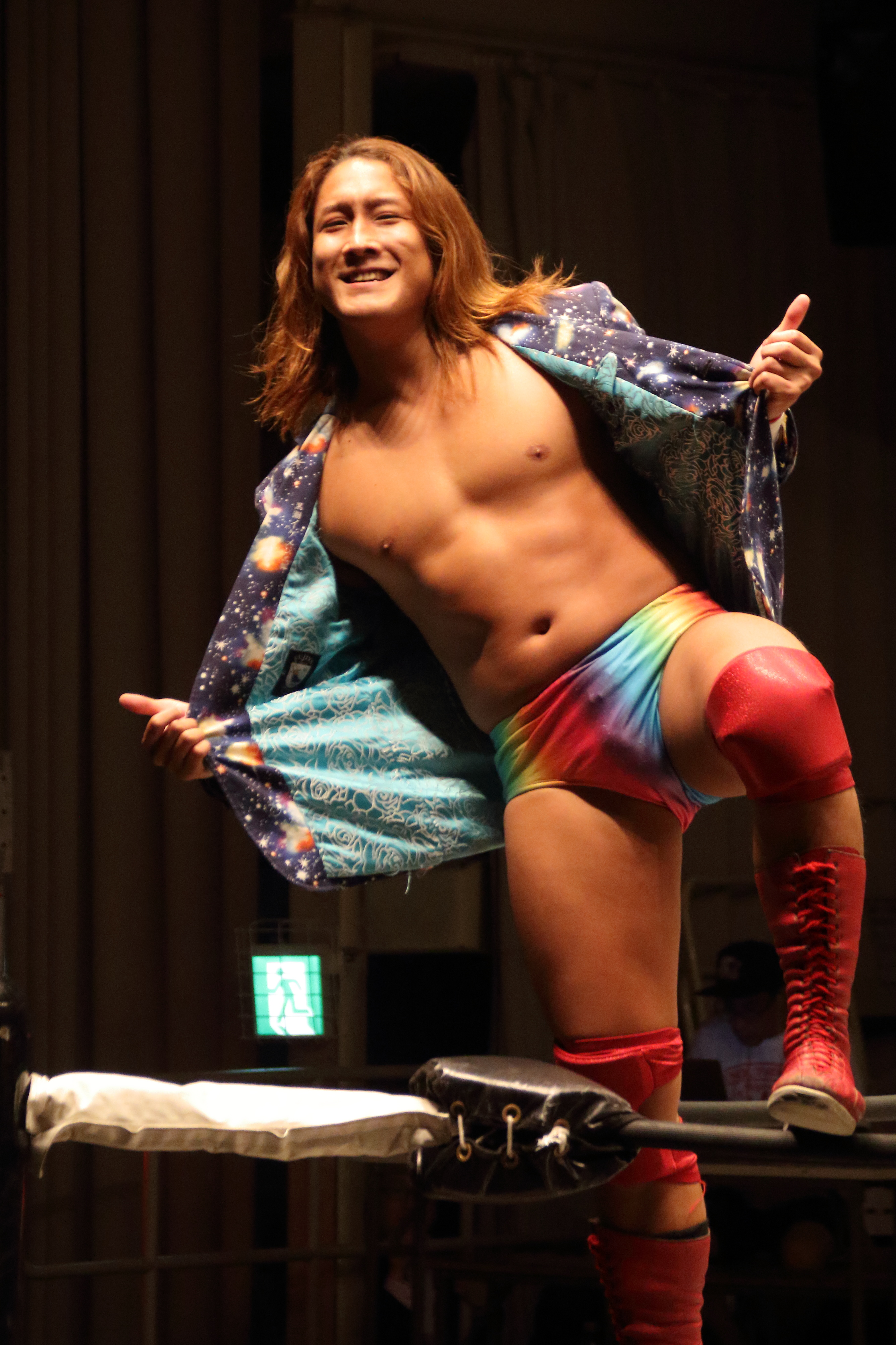 ＠後楽園ホール